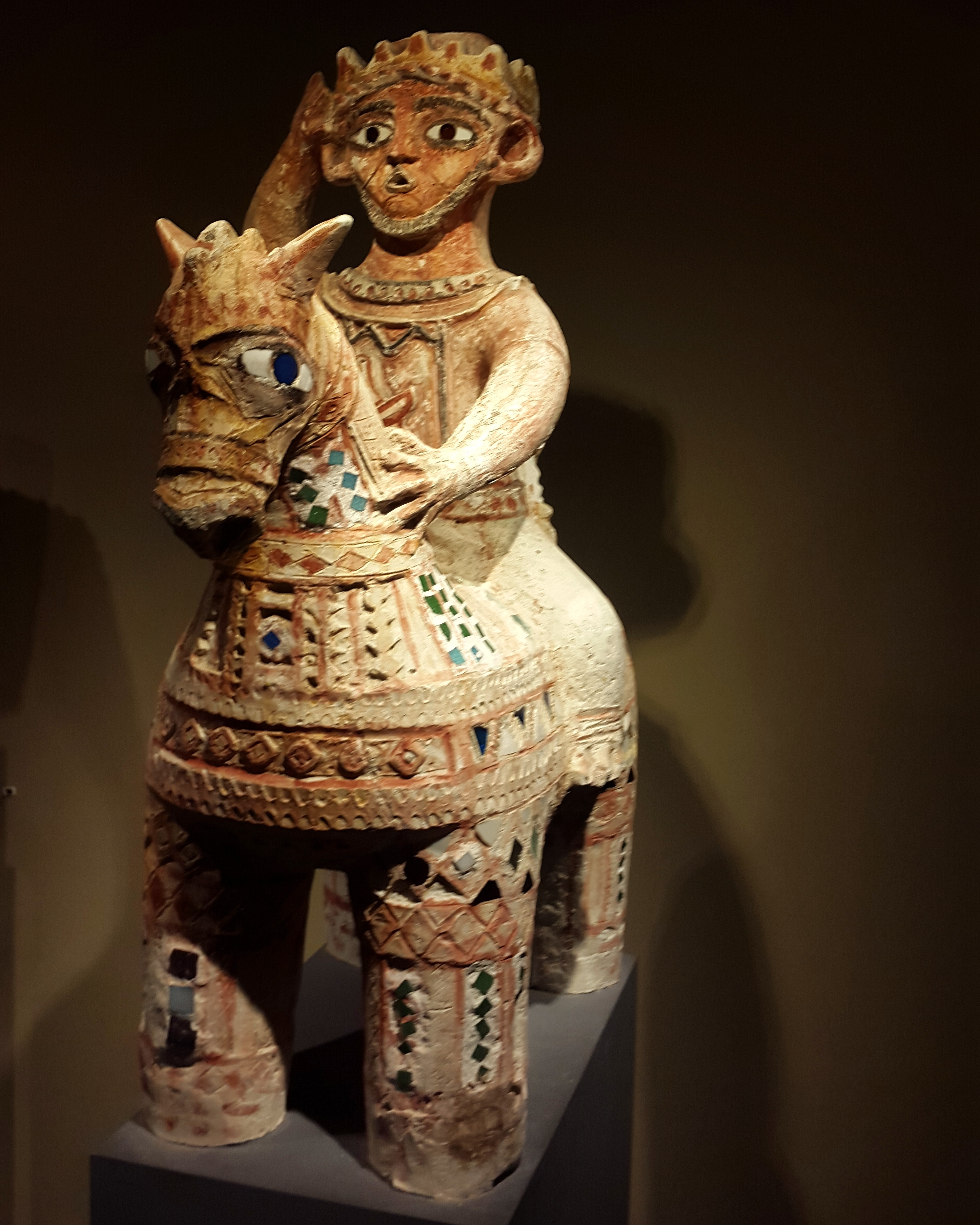 فارس البلد عمل للنحات أحمد عبد الوهاب، مكتبة الاسكندرية-الفنون الشعبية.